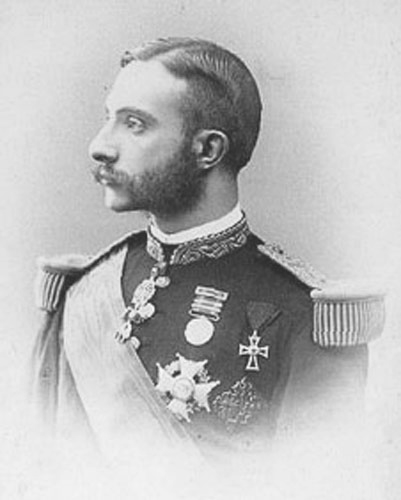 Fotografía de Alfonso XII, rey de España